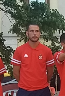 Pedro Alcalá en la presentación de la temporada 2016/17